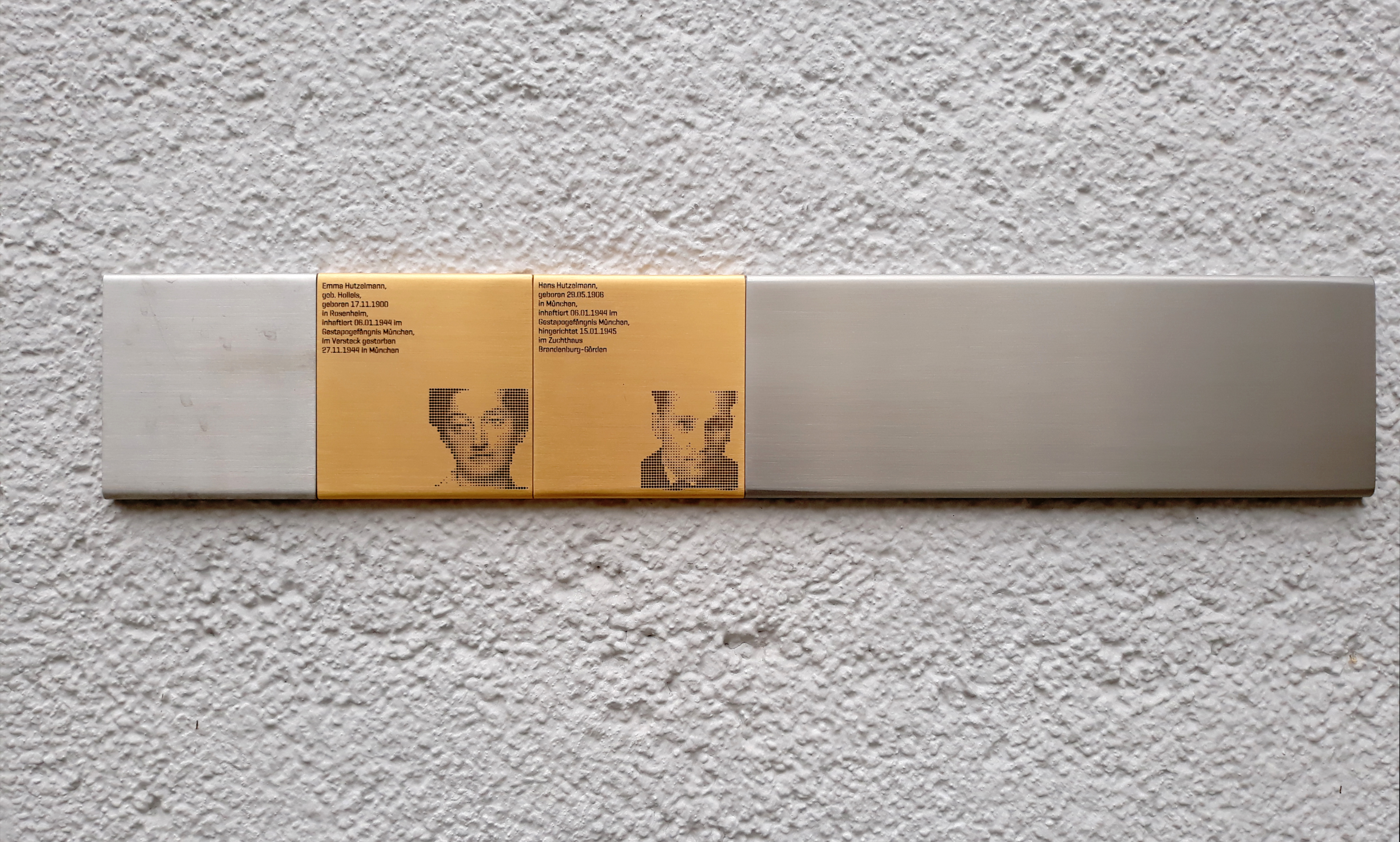 Gedenktafel für Emma Hutzelmann und Hans Hutzelmann an der Fassade des von ihnen bewohnten Hauses Margarethenstraße 18 in München-Sendling. Die Tafeln im Design von Kilian Stauss sind der Münchner Ersatz für Stolpersteine.